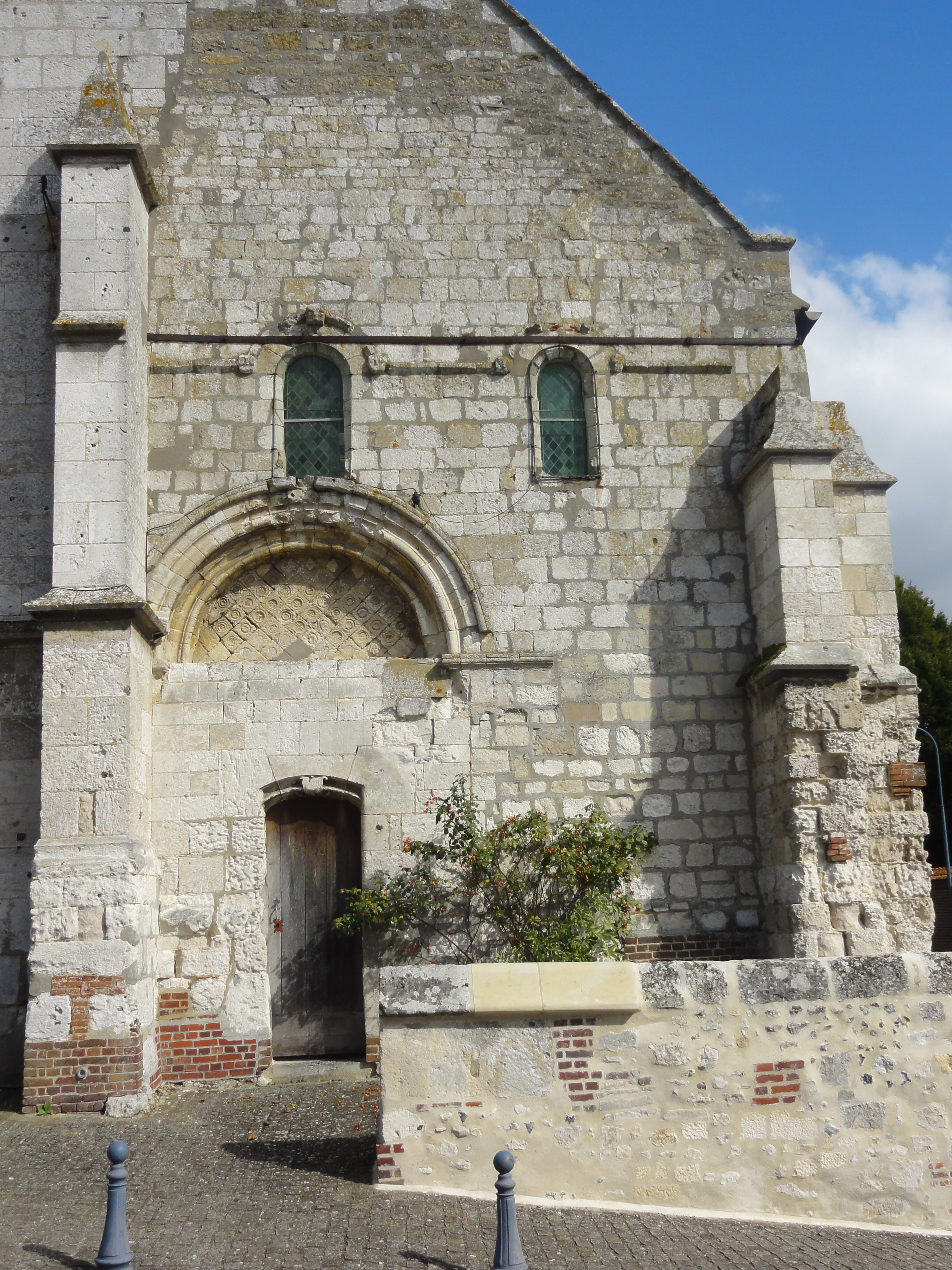 Église Notre-Dame de l'Annonciation - voir titre.